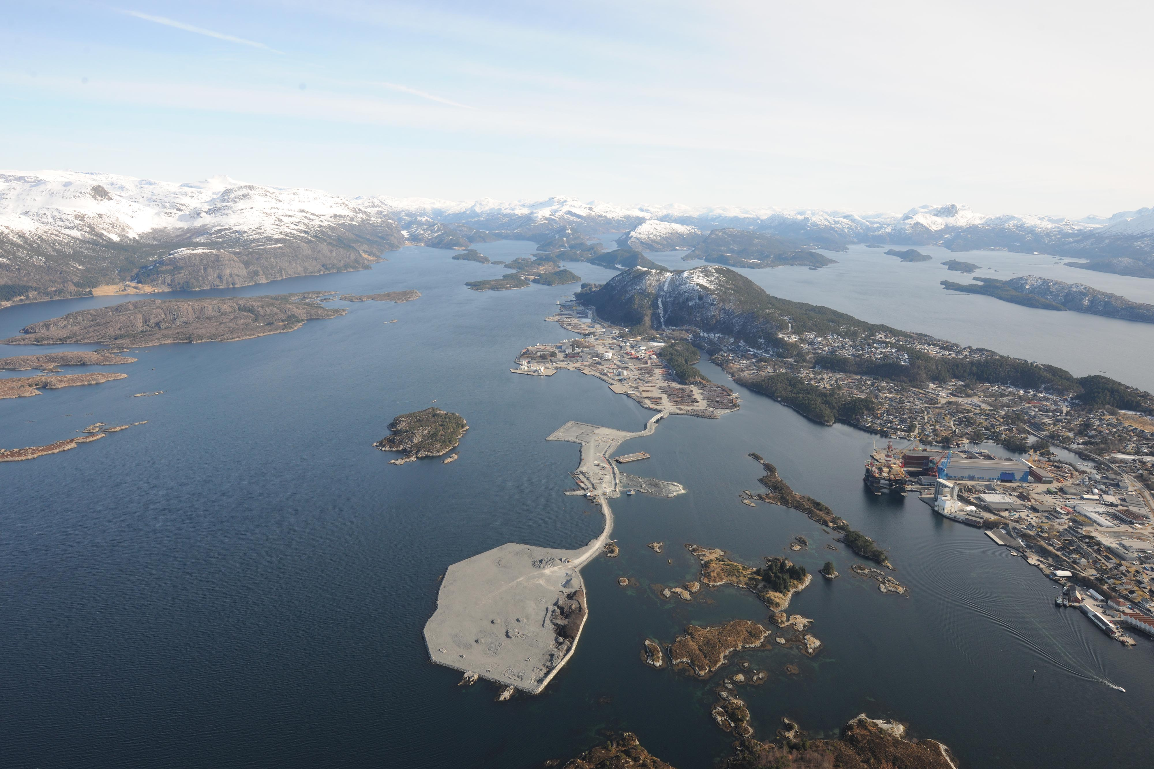 Her ser vi et oversiktsbilde av Fjord Base, og det nye arealet i vest.